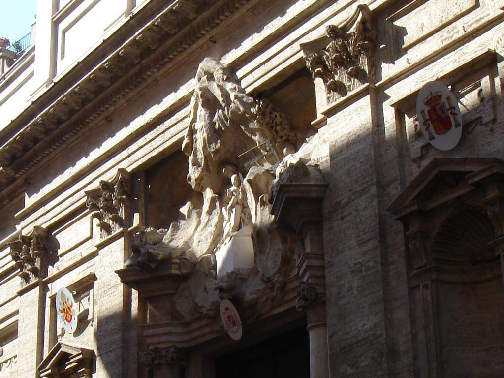 Roma, Santa Maria di Monserrato: particolare della facciata